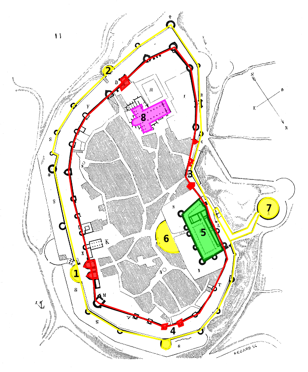 Plan de la cité de Carcassonne : en rouge enceinte intérieure et portes, en jaune enceinte extérieure et barbacanes. 1-Porte Narbonnaise et barbacane Saint-Louis, 2- Porte et barbacane Saint-Nazaire, 3 - Porte d'Aude, 4-porte du Bourg et barbacane Notre-Dame, 5-château comtal, 6-barbacane de l'est, 7-Barbacane de l'Aude, 8-église Saint-Nazaire